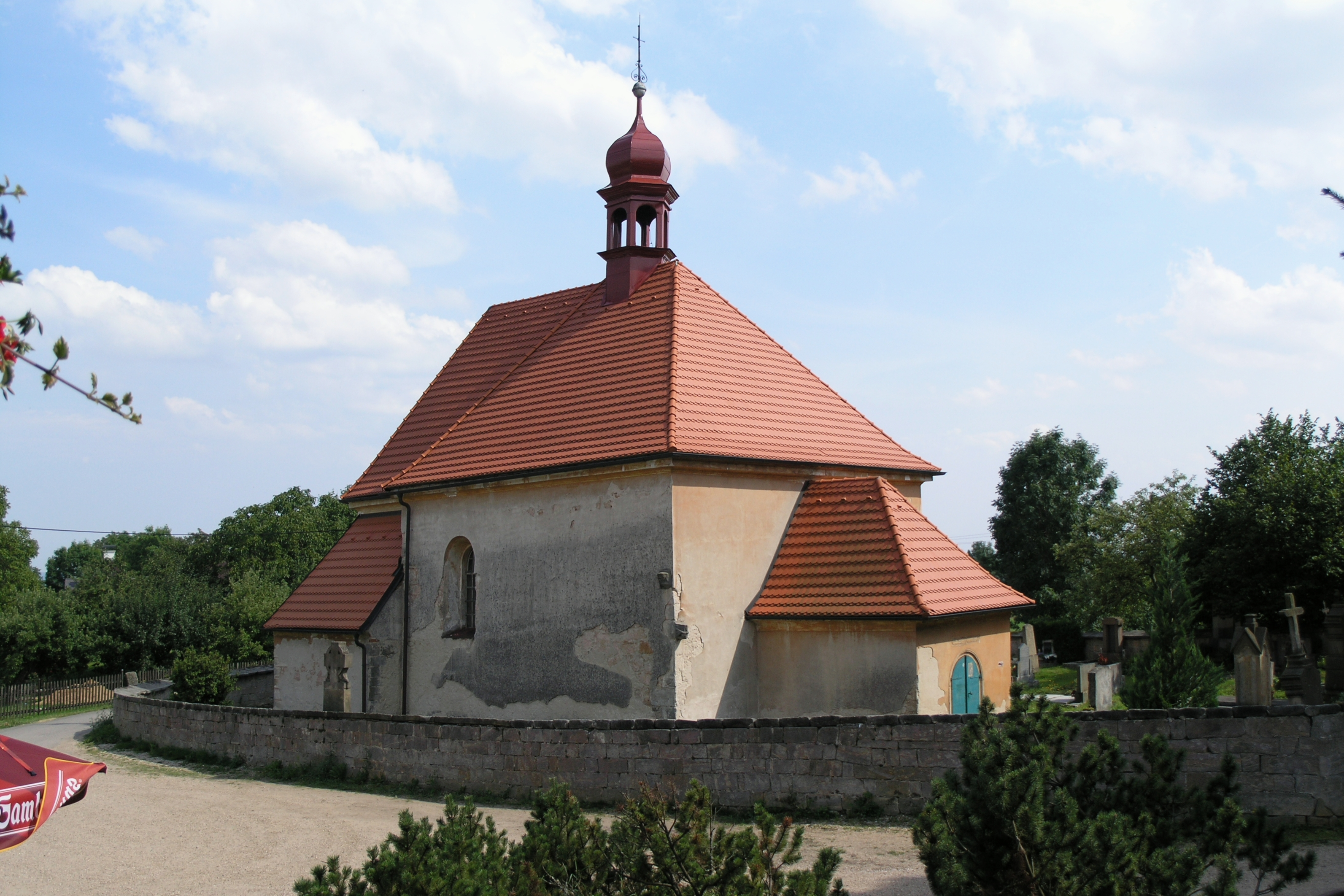 Kostel svatého Bartoloměje ve vsi Brada, místní části obce Brada-Rybníček